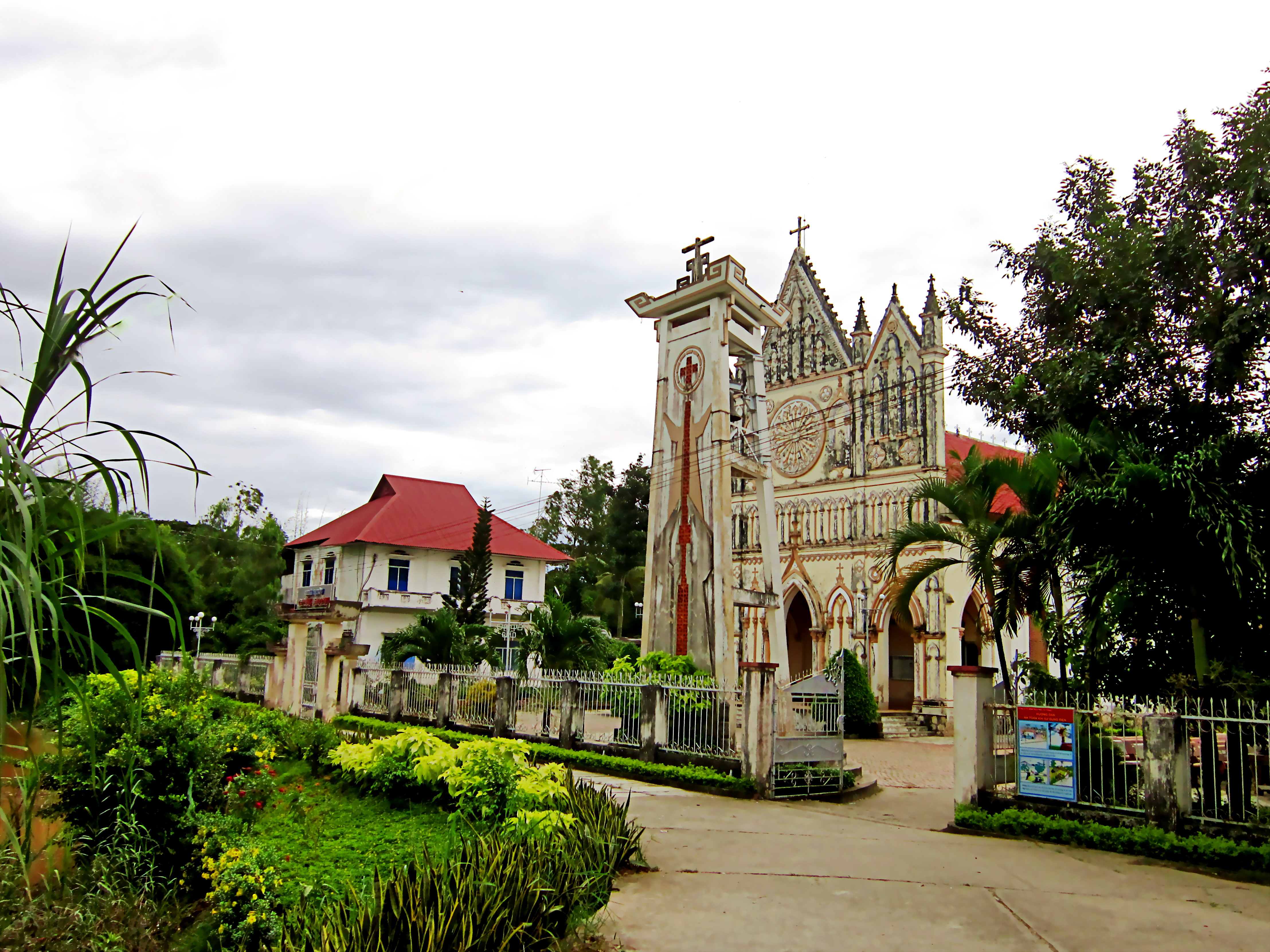 Nhà thờ Cái Đôi ở ấp An Lương, xã Hoà Bình (thuộc huyện Chợ Mới, tỉnh An Giang, Việt Nam), được khởi công xây dựng vào năm 1906 và tồn tại cho đến ngày nay